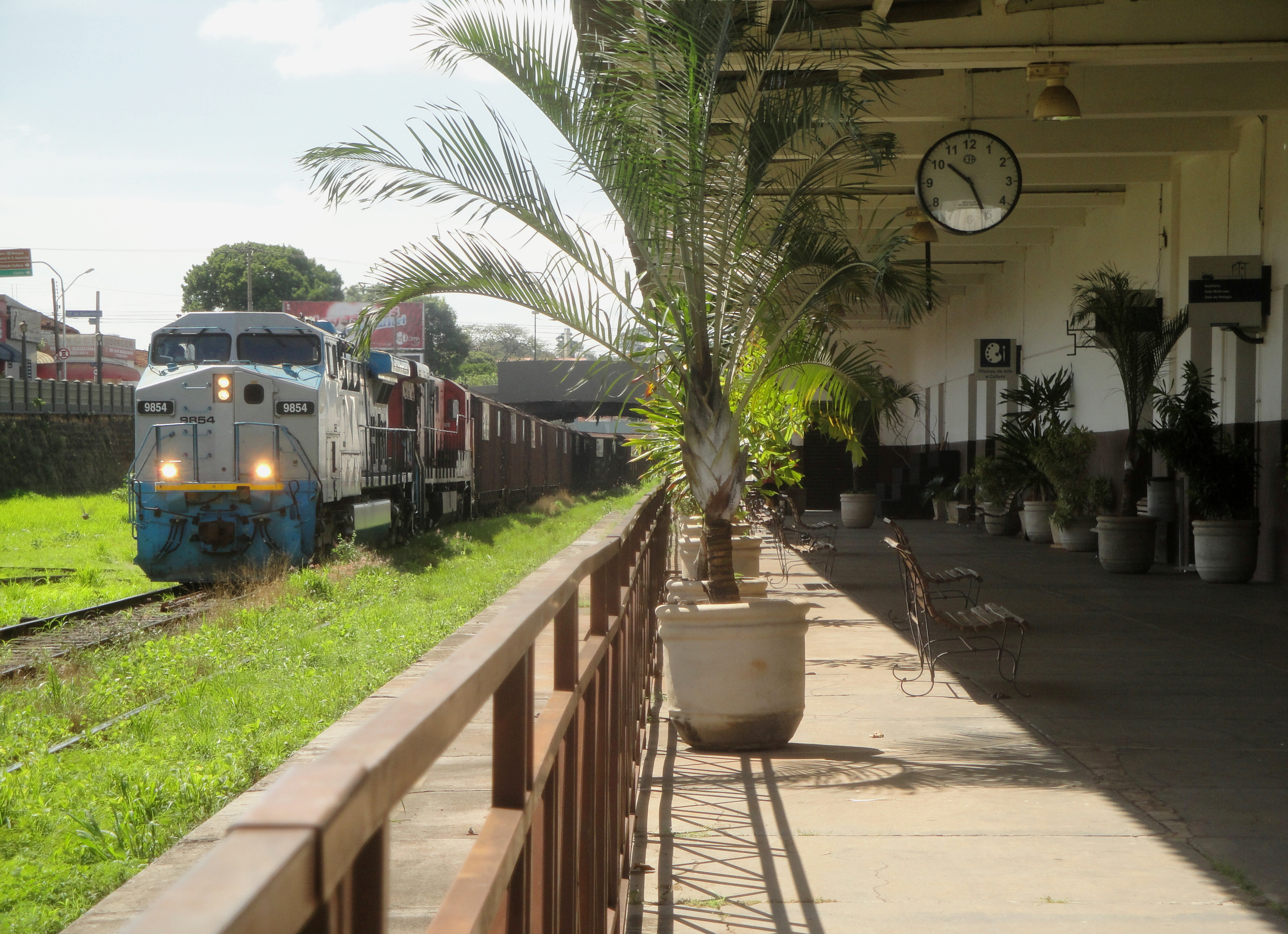 Estação Ferroviária de Catanduva/SP. Em 1912, a linha-tronco de bitola métrica foi concluída, chegando em São José do Rio Preto. Nesta época a linha passava pela Vila Adolfo (antigo nome de Catanduva e distrito de Rio Preto) Em 1917, o nome foi alterado para Catanduva, quando da criação do município. O prédio atual foi inaugurado em 15 de maio de 1948, em 10 de setembro de 1955, passou o último trem na bitola métrica, sendo substituída naquela noite pela bitola larga com 1.6 mt.